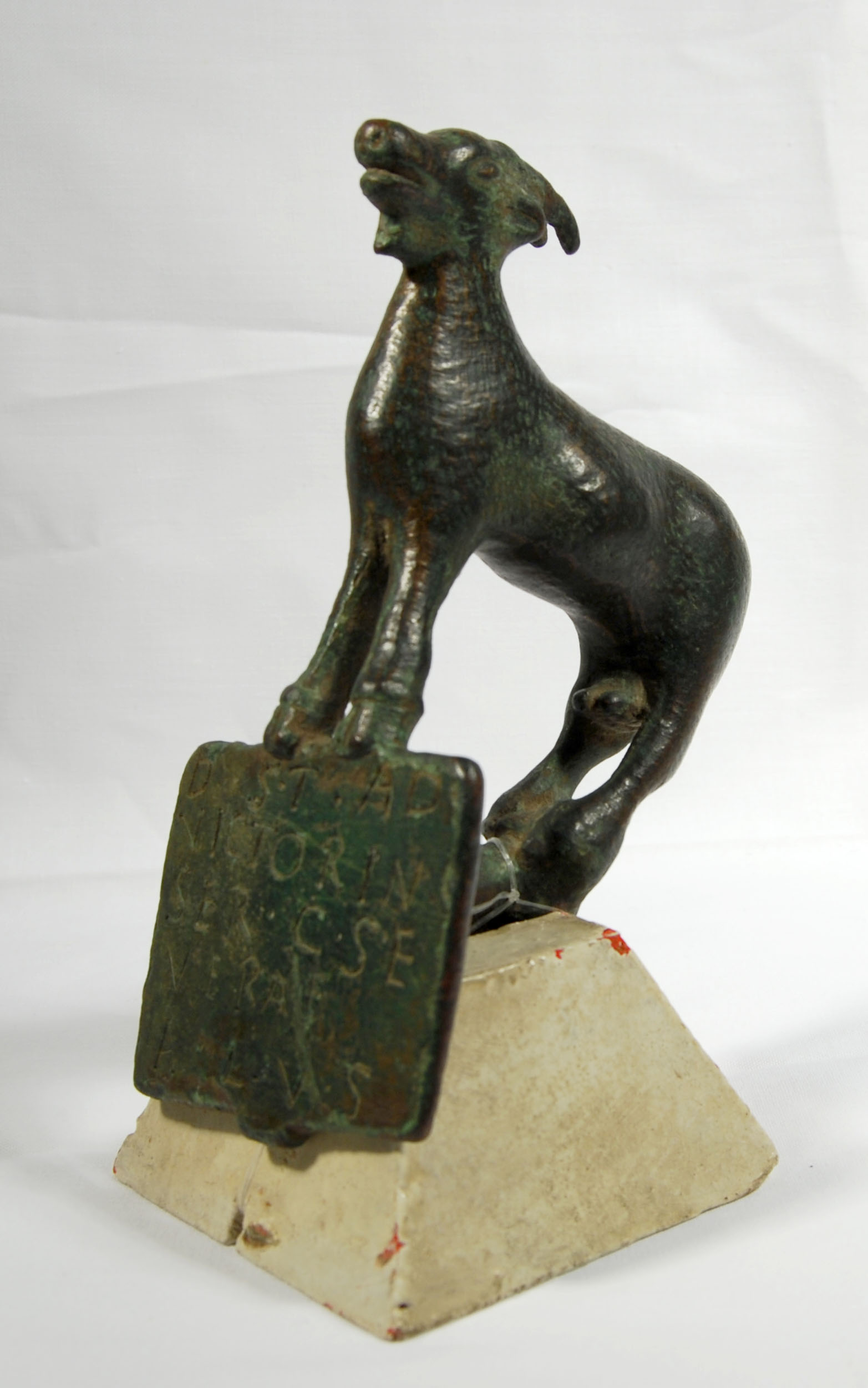 Exvoto iberico de cabra ibérica